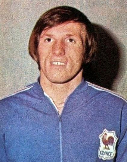 Théodule Toulotte (1976), 'Montreal 76', Panini figurina n°238.